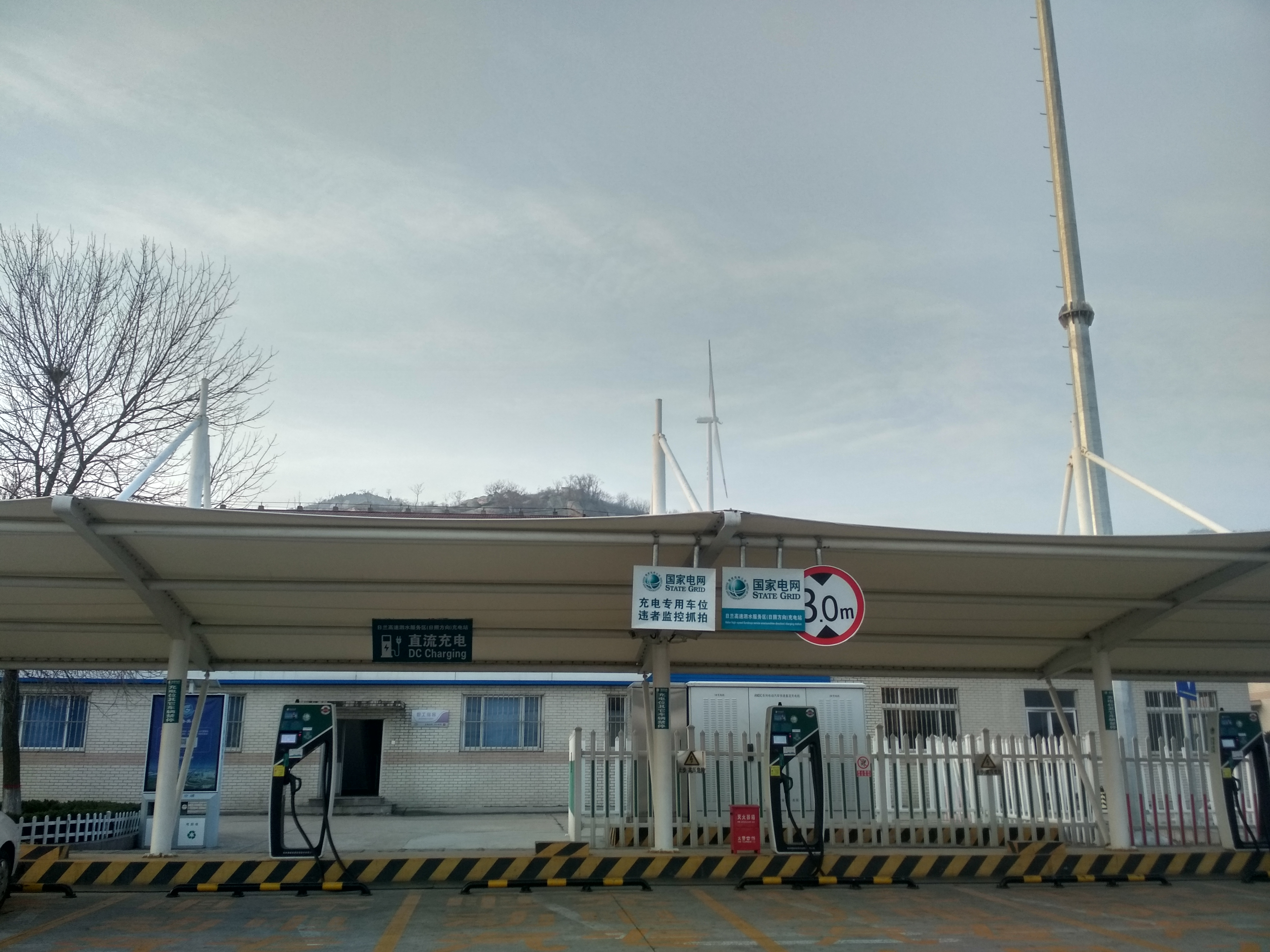 中文（中国大陆）: 中国国家电网充电桩